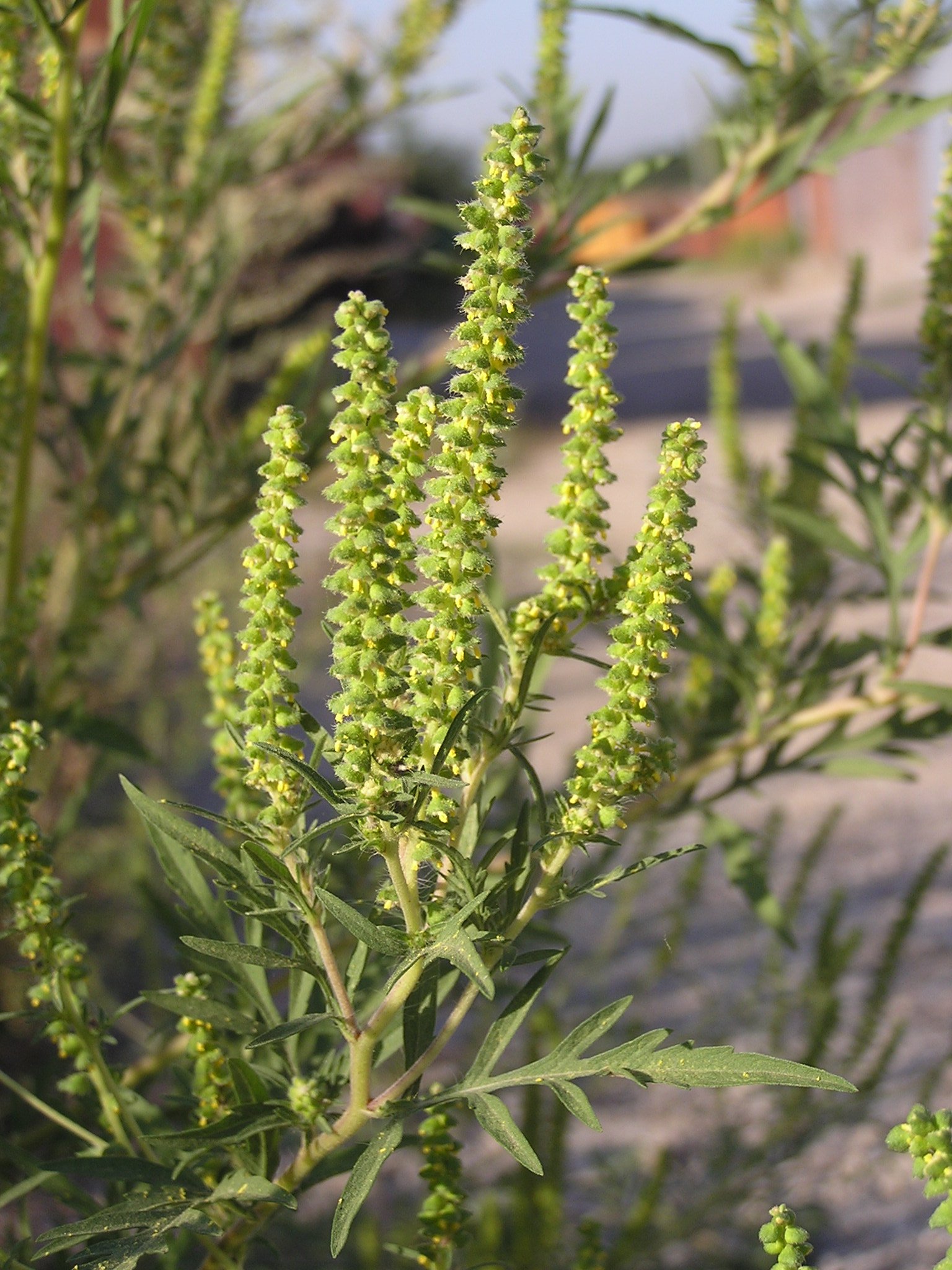 Растение